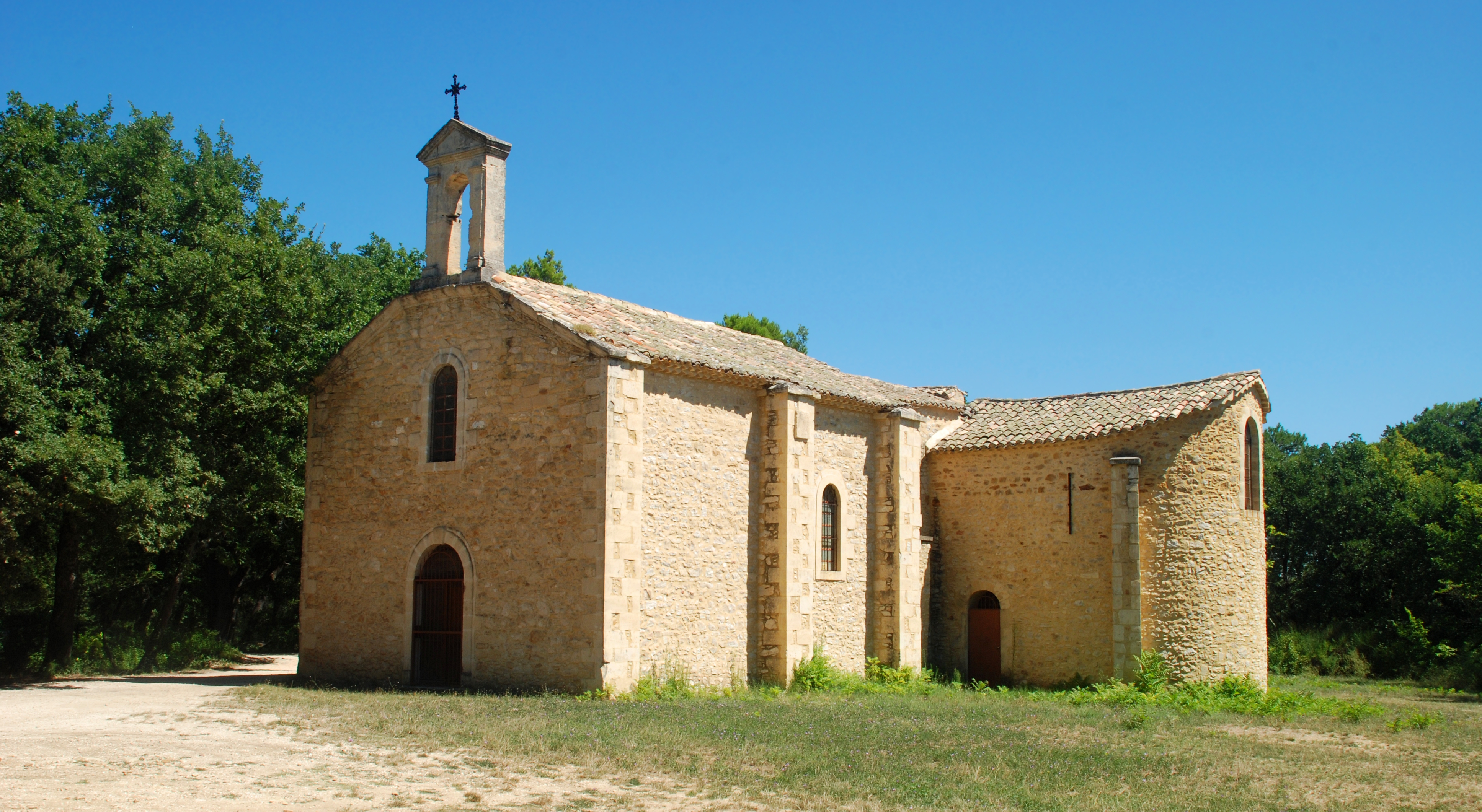 France - Gard - Cavillargues - Ermitage Notre-Dame-du-Saint-Sépulcre .